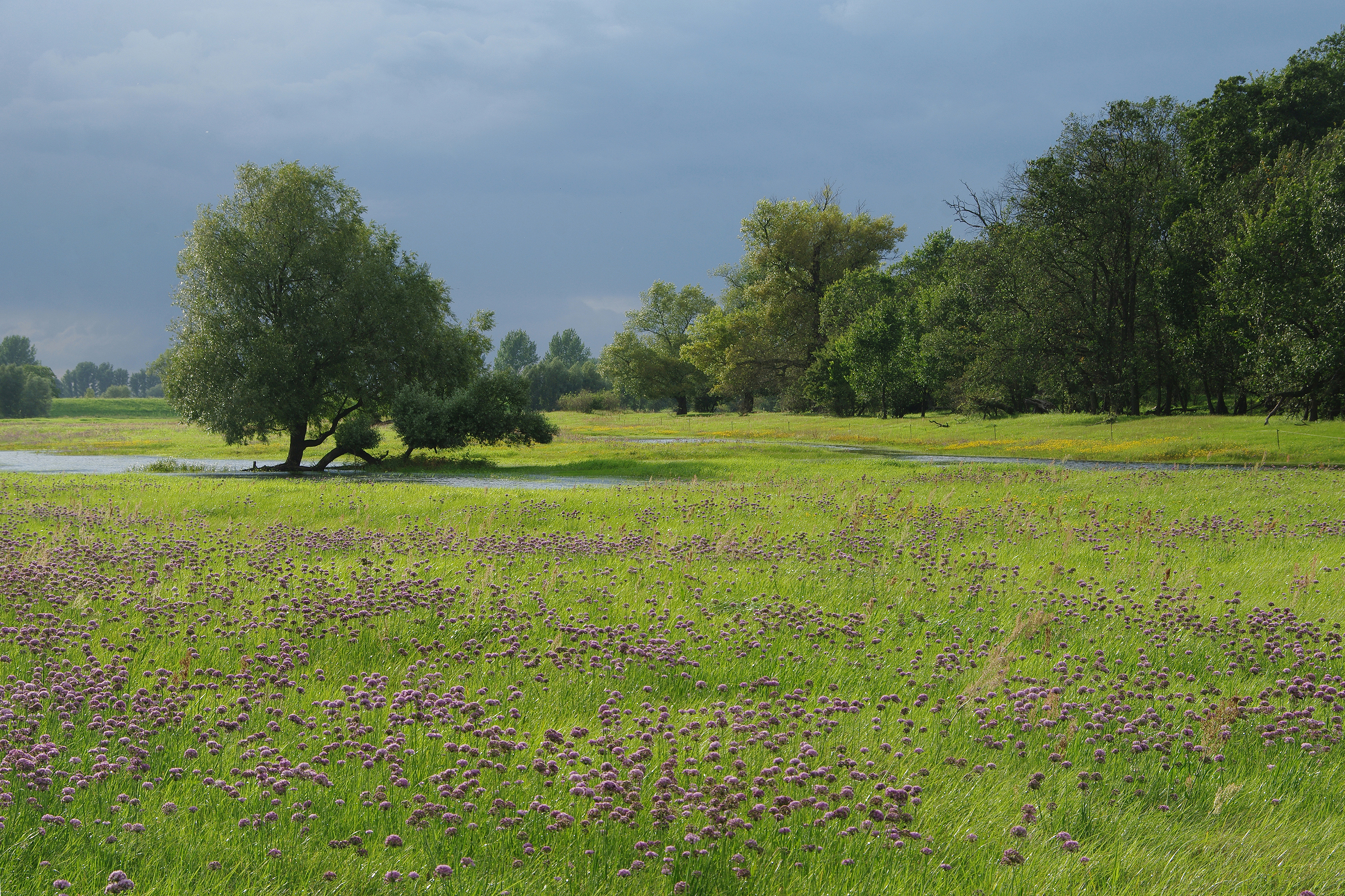 Artenreiche Auenwiese im Oderbruch bei Genschmar (Lkr. Märkisch-Oderland, Brandenburg) mit Blühaspekt des Kantigen Lauchs (Allium angulosum) sowie Hutewald im Überflutungsbereich der Oder. NSG und FFH-Gebiet „Oderaue Genschmar“. Bestandteil des EU-Vogelschutzgebiets „Mittlere Oderniederung“. Externer Link: Oderaue Genschmar und Oderaue Kienitz.